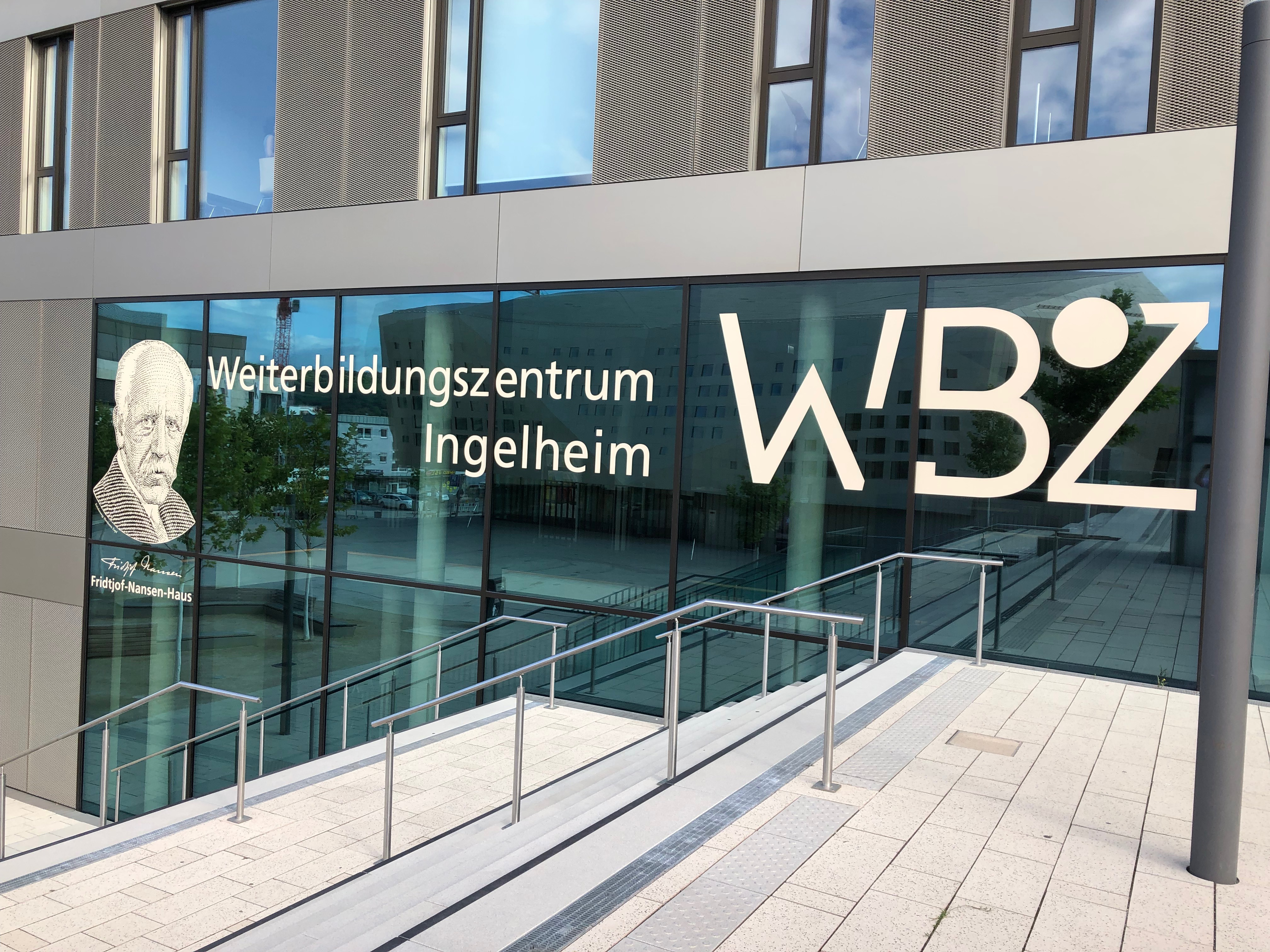 Das neue Fridtjof-Nansen-Haus am Fridtjof-Nansen-Platz 3 in Ingelheim, Sitz des Weiterbildungszentrums Ingelheim